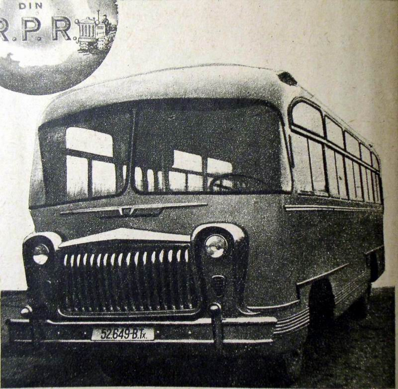 Autobuz Mao Tse Dong